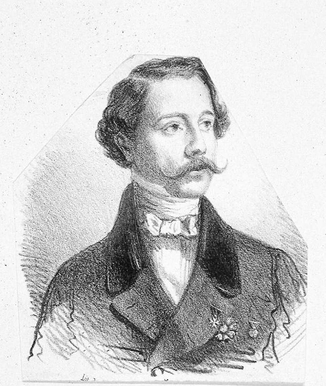 Joaquín Gutiérrez de la Vega, Retrato de José Gutiérrez de la Vega y Moncloa, 1851. Establecimiento litográfico de Peant. Biblioteca Nacional de España